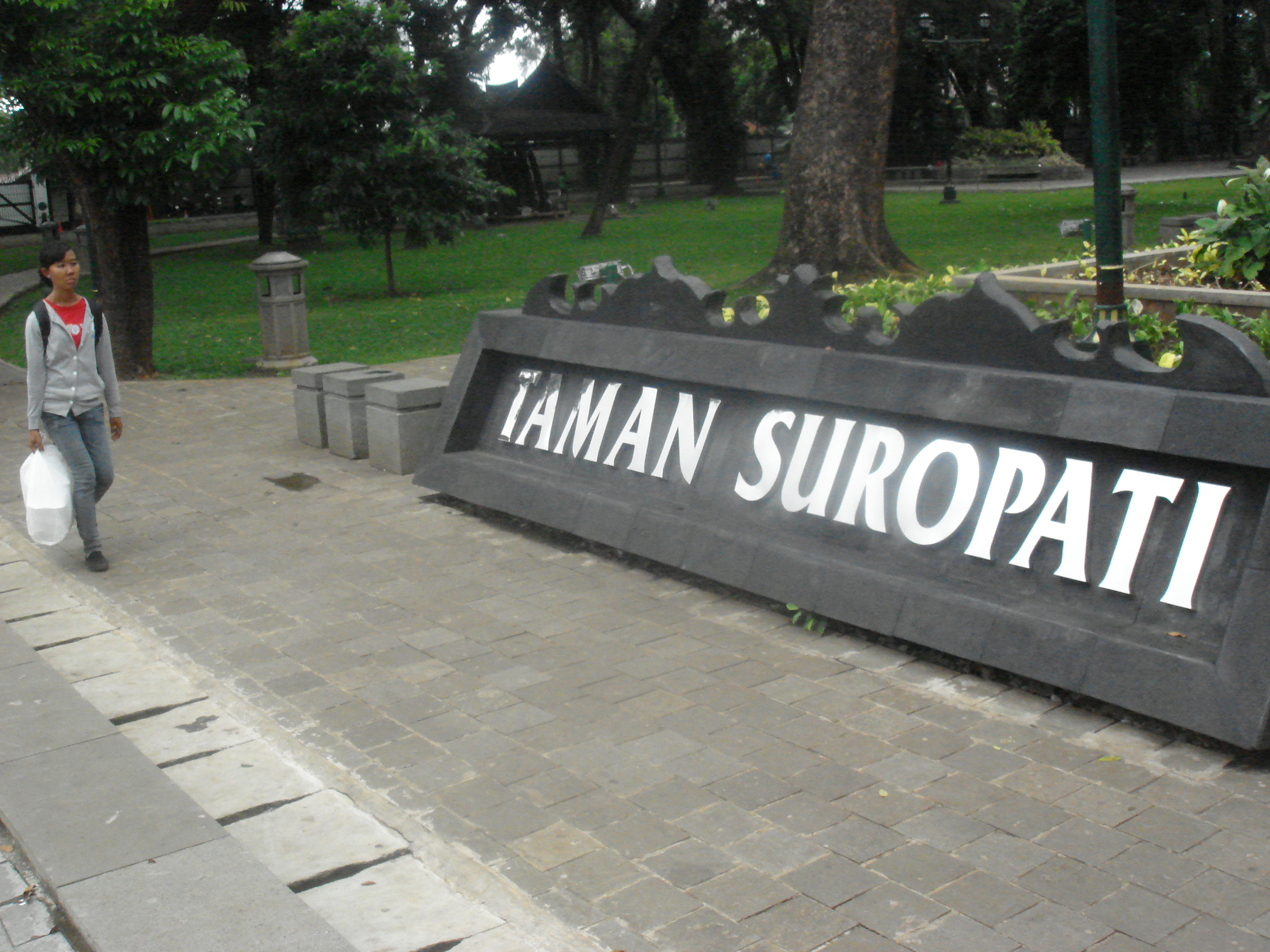 Taman Suropati, Jakarta, Indonesia